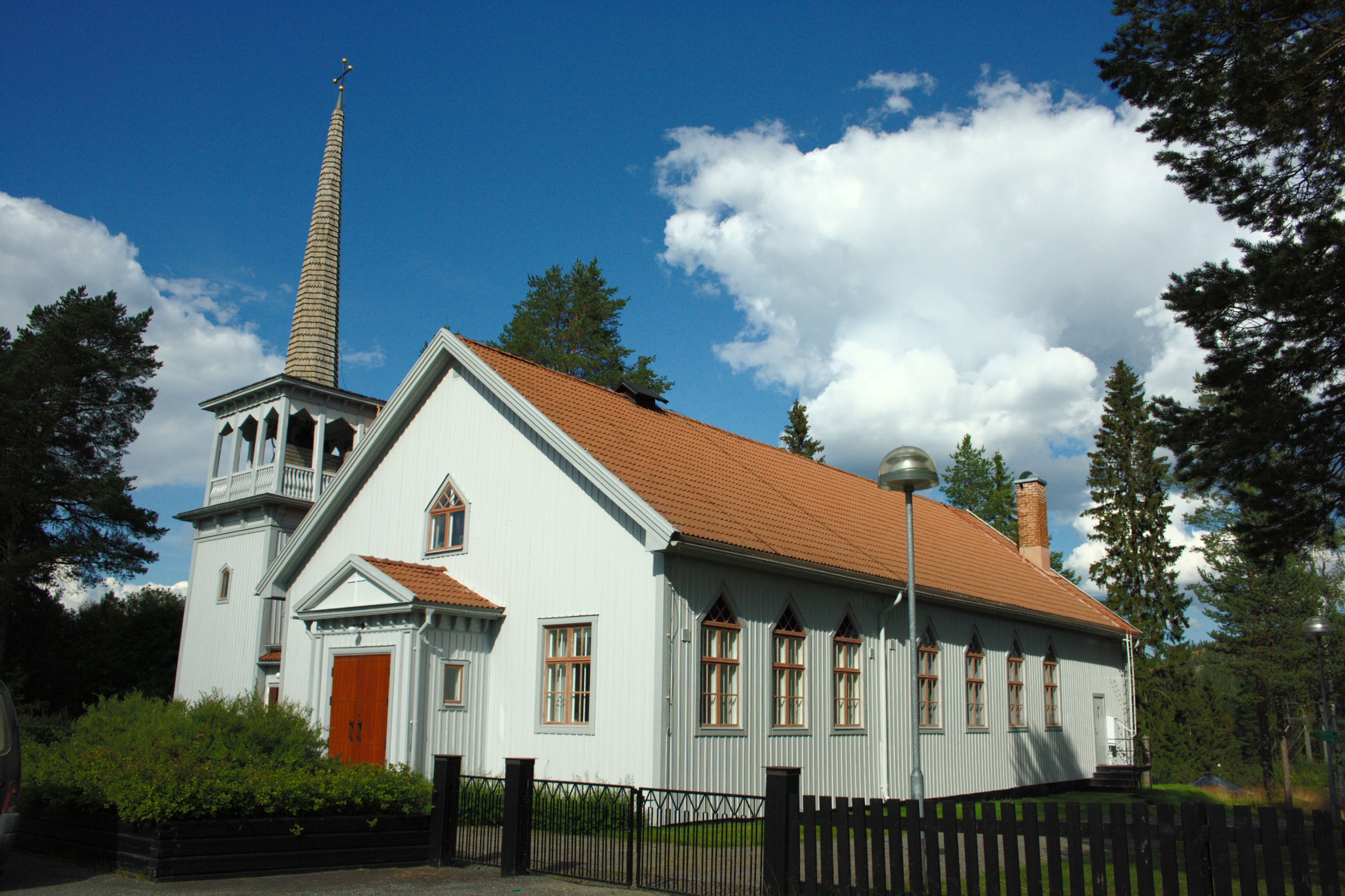 Bygdsiljums kyrka i Västerbotten